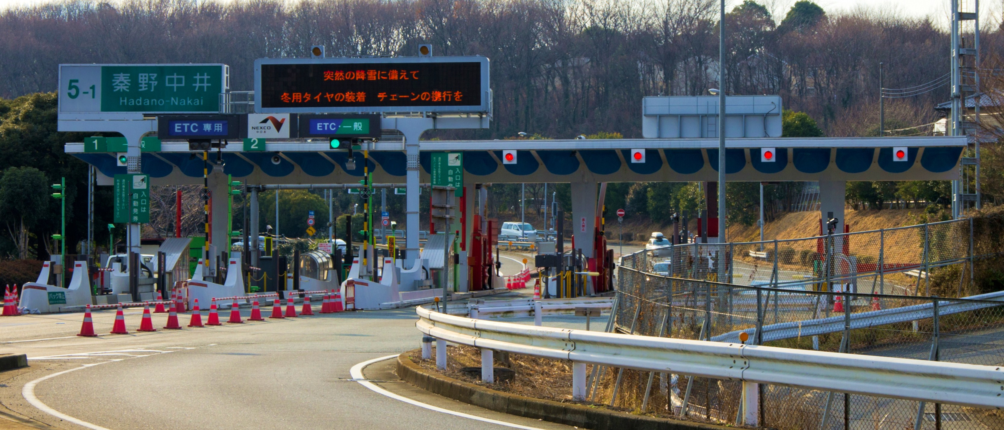 東日本高速道路株式会社 東名高速自動車道 秦野中井インターチェンジ